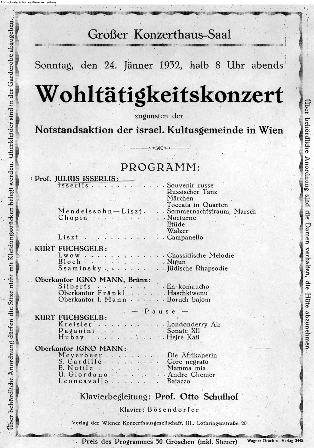 Афиша выступления Julius Isserlis, фото из общественного государственного архива Австрии